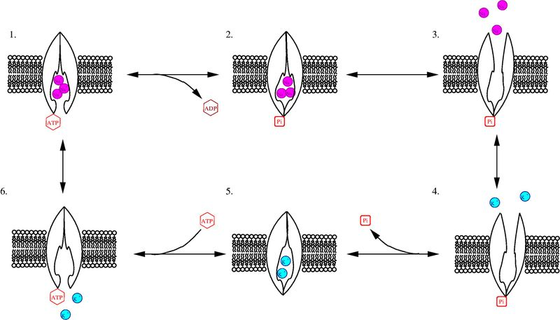 Cycle de la pompe sodium, au court de la dégradation d'une ATP, 3 sodium sont exportés, et 2 potassium importé. fichier xfig disponible, demander à